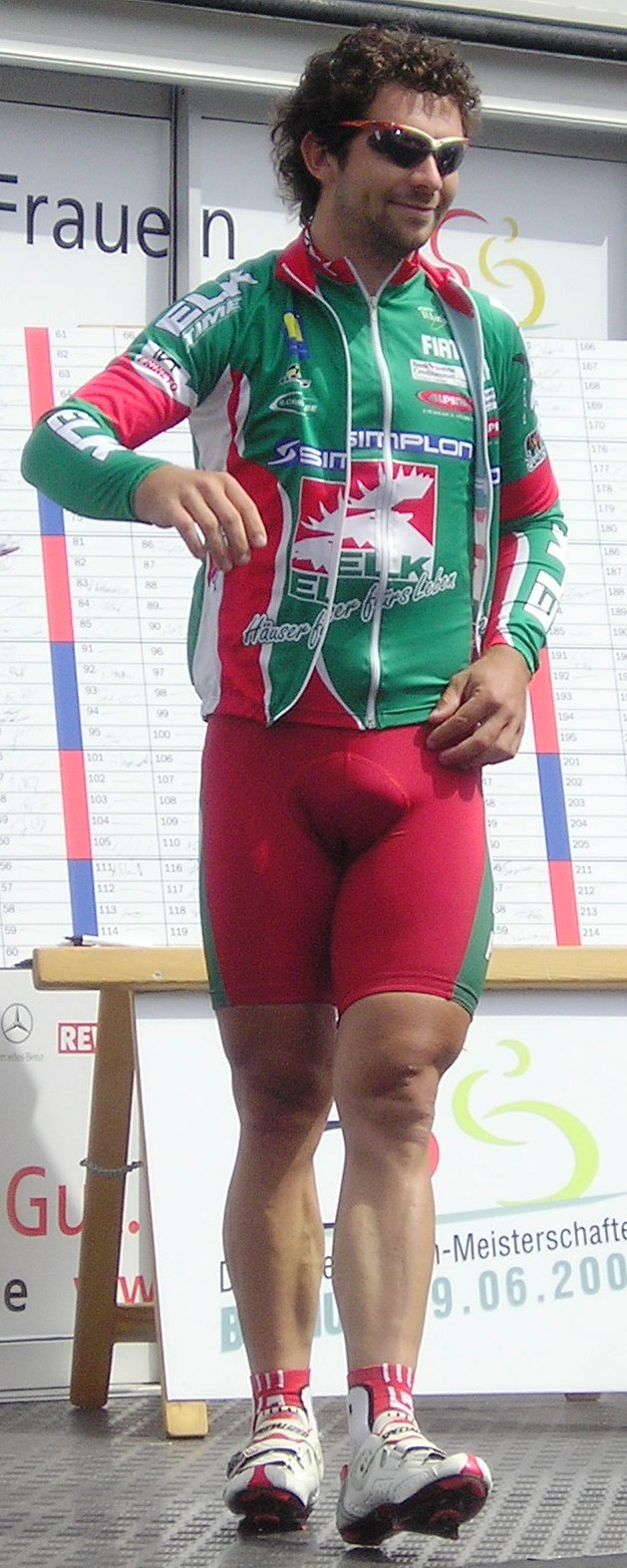 Steffen Radochla before the start of the Deutsche Meisterschaften Straßenrennen, Bochum, Germany, June 29, 2008